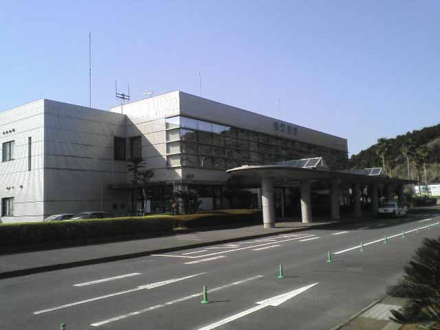 Fukue airport, in Gotoh city, Nagasaki, Japan 長崎県五島市福江空港